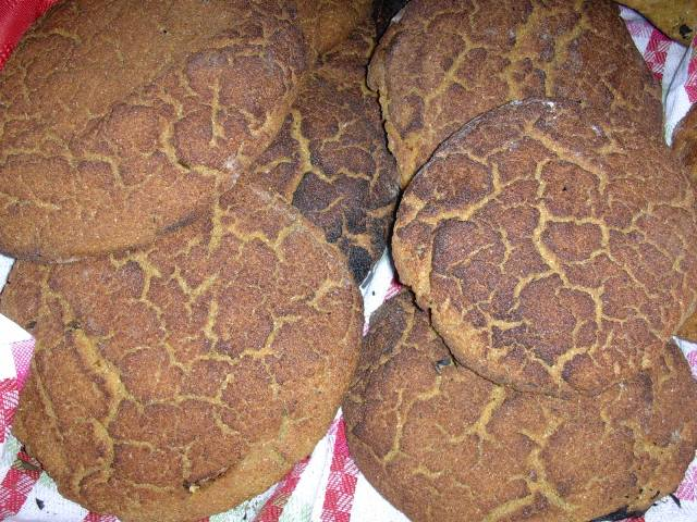 Autorizzazione OTRS # 2008022710009155